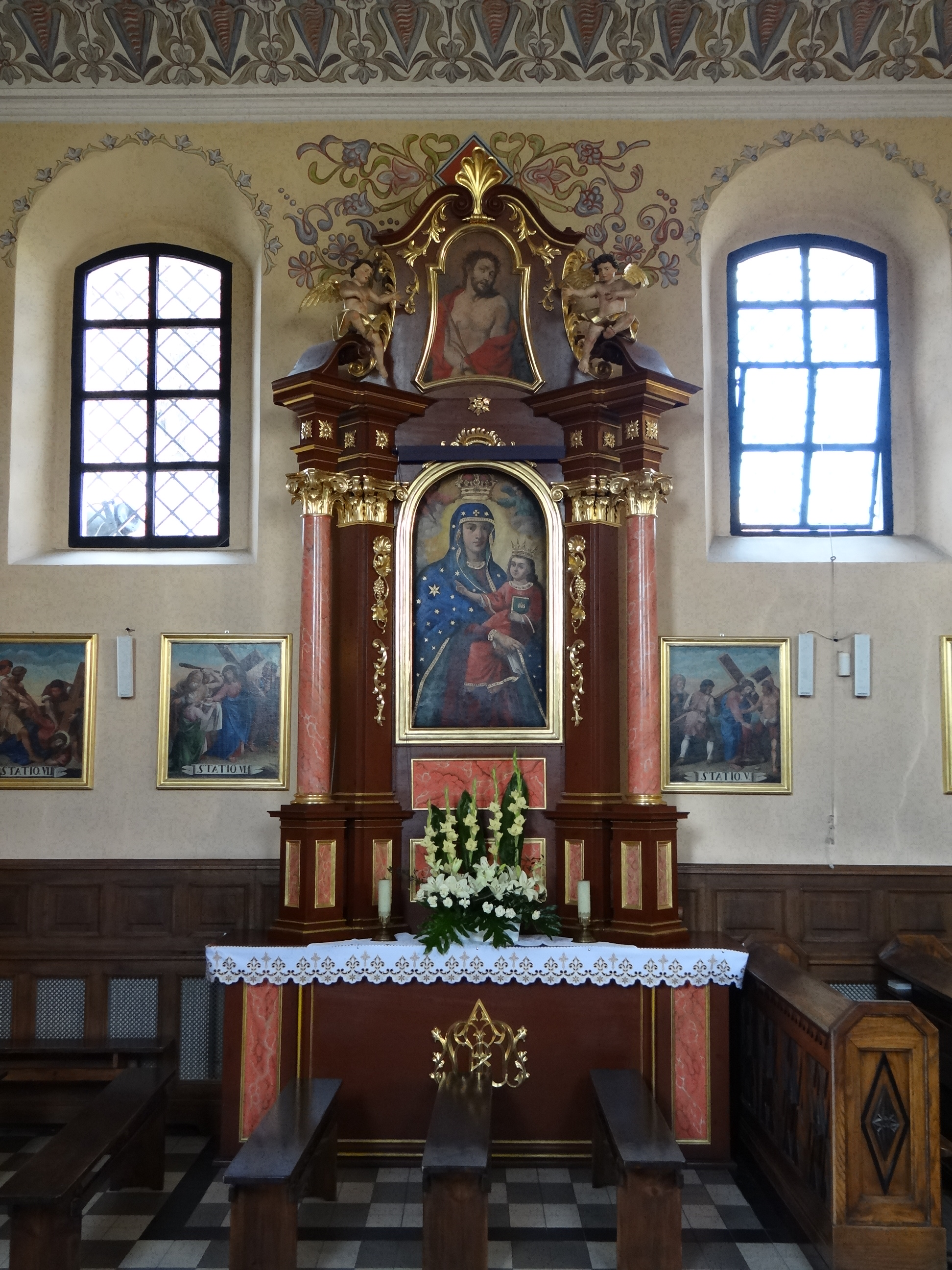 Radziszów, zespół kościoła par. pw. śś. Wawrzyńca i Małgorzaty, XV, XIX